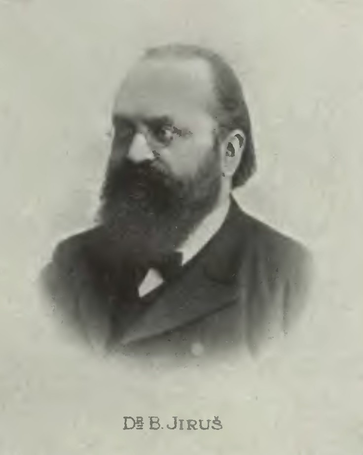 Portrét – rytíř Bohuslav Jiruš (1841-1901), Český lékař a botanik.